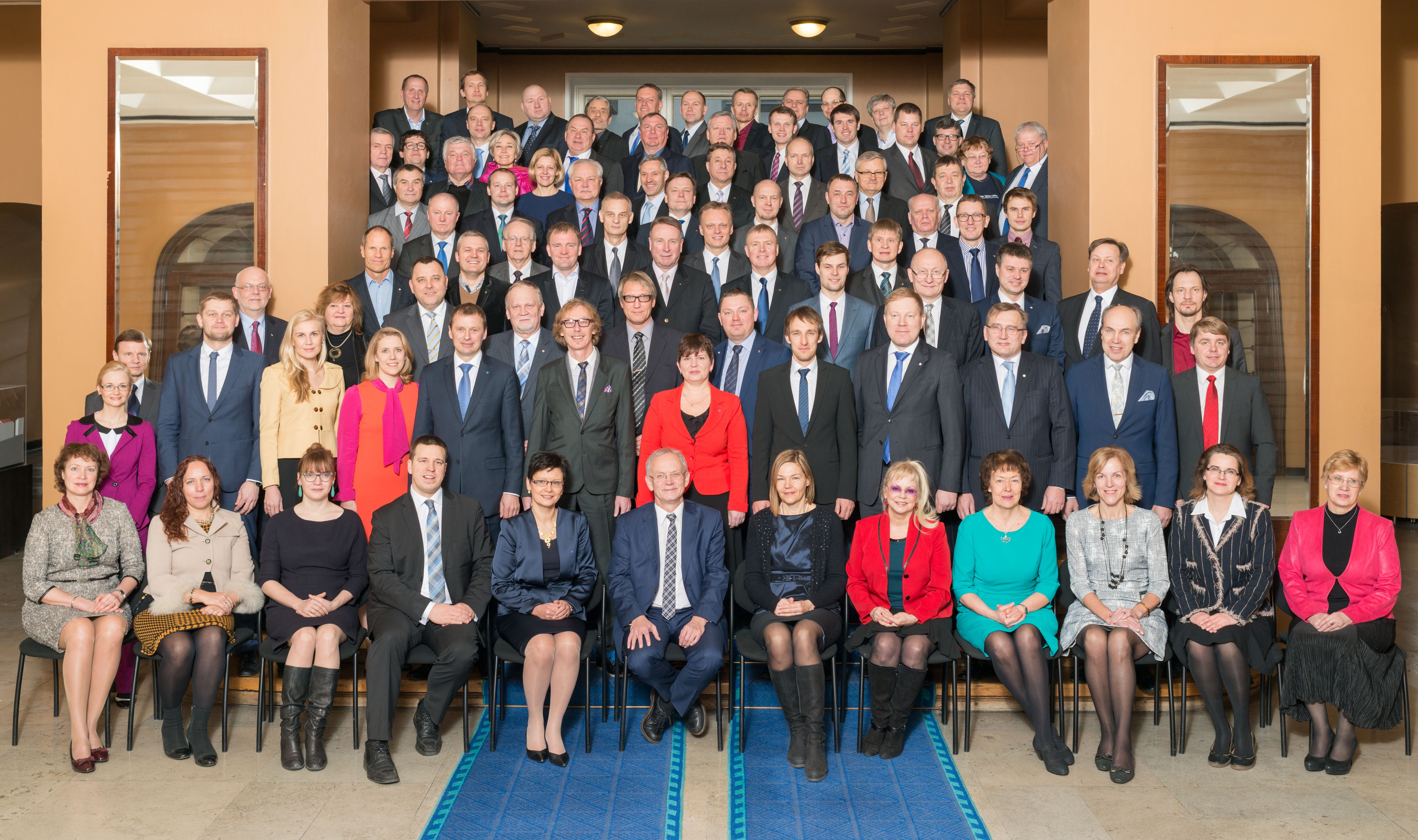 Riigikogu XII koosseisu lõpupilt.